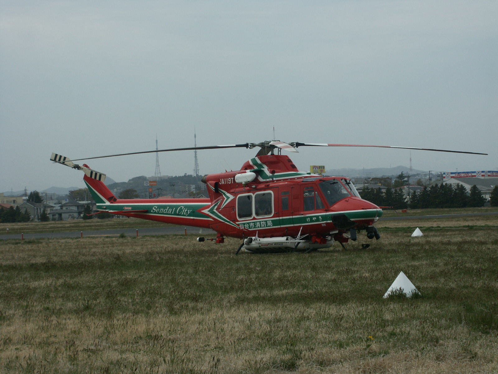 仙台市消防航空隊ヘリコプター「けやき」 Bell_412 （正面左側を撮影）